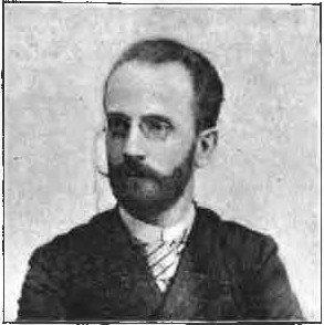 portret Edmunda Krzymuskiego z książki "Upominek. Książka zbiorowa na cześć Elizy Orzeszkowej (1866-1891)"